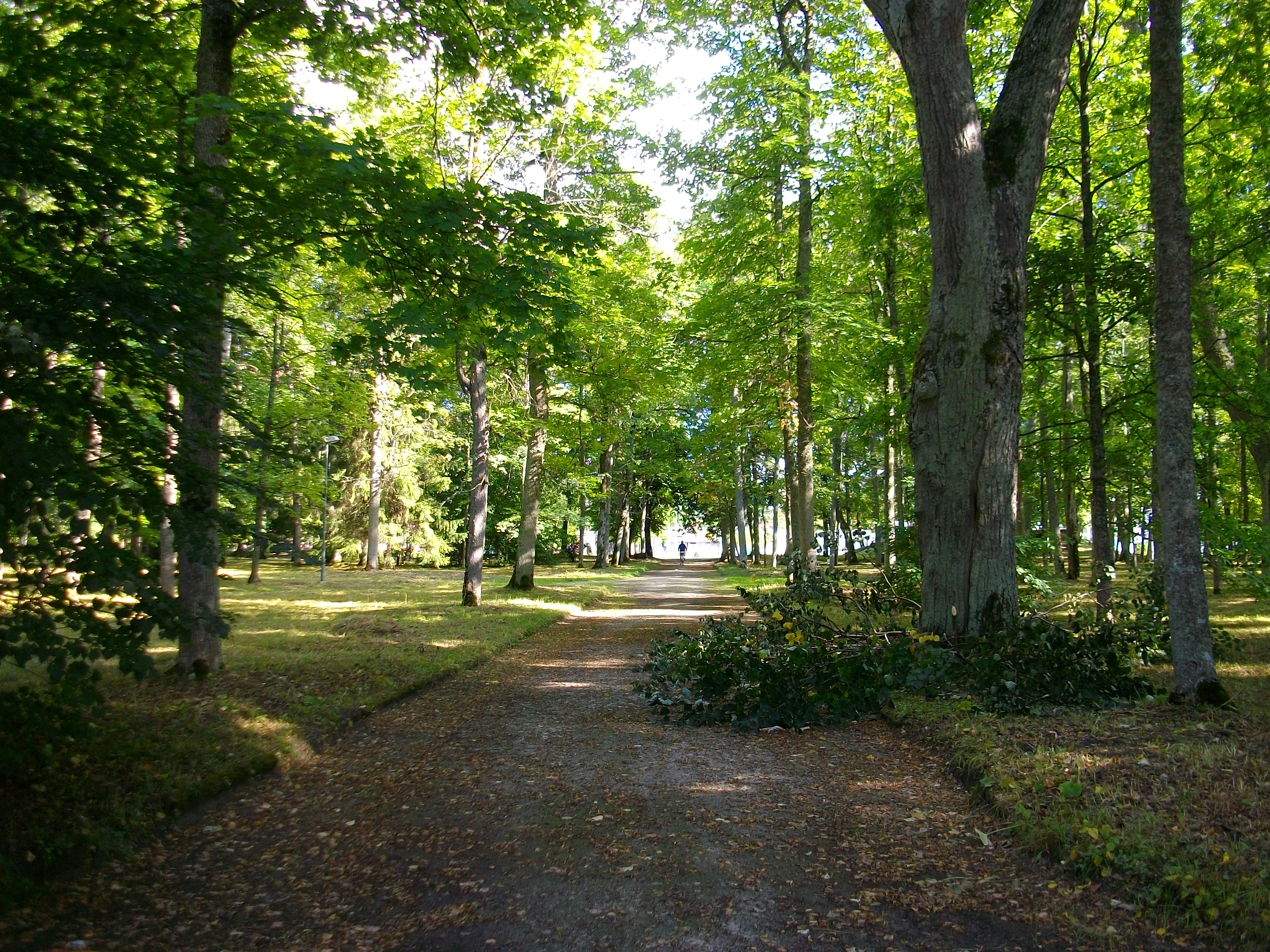 Uue-Põltsamaa mõisa park roheluses